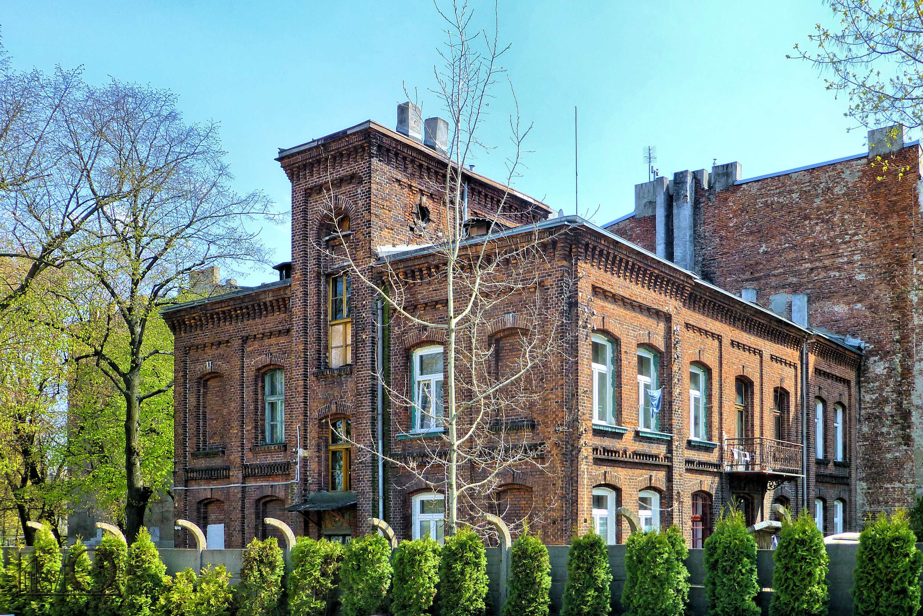 Polesie, Łódź, Poland